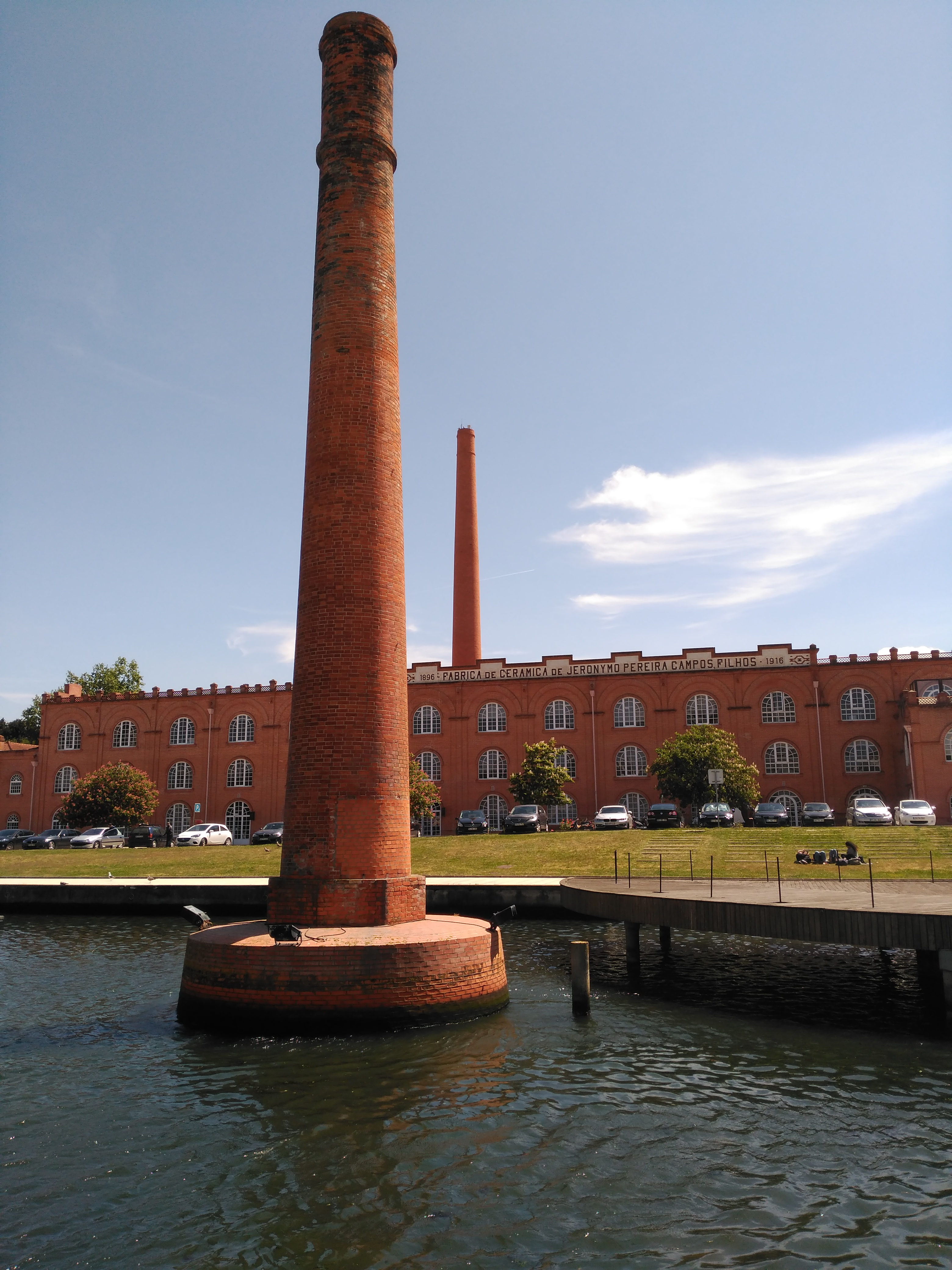 Chimenea de la antigua fábrica cerámica de Jeronymo Pereira en Aveiro (Portugal)